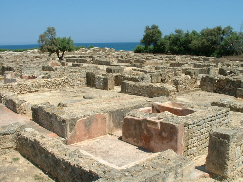 Photographie personnelle prise sur le site de Kerkouane (Tunisie); vue générale d'une partie du sute, avec en relief une salle bains (baignoire+lavabo) en couleur rouge